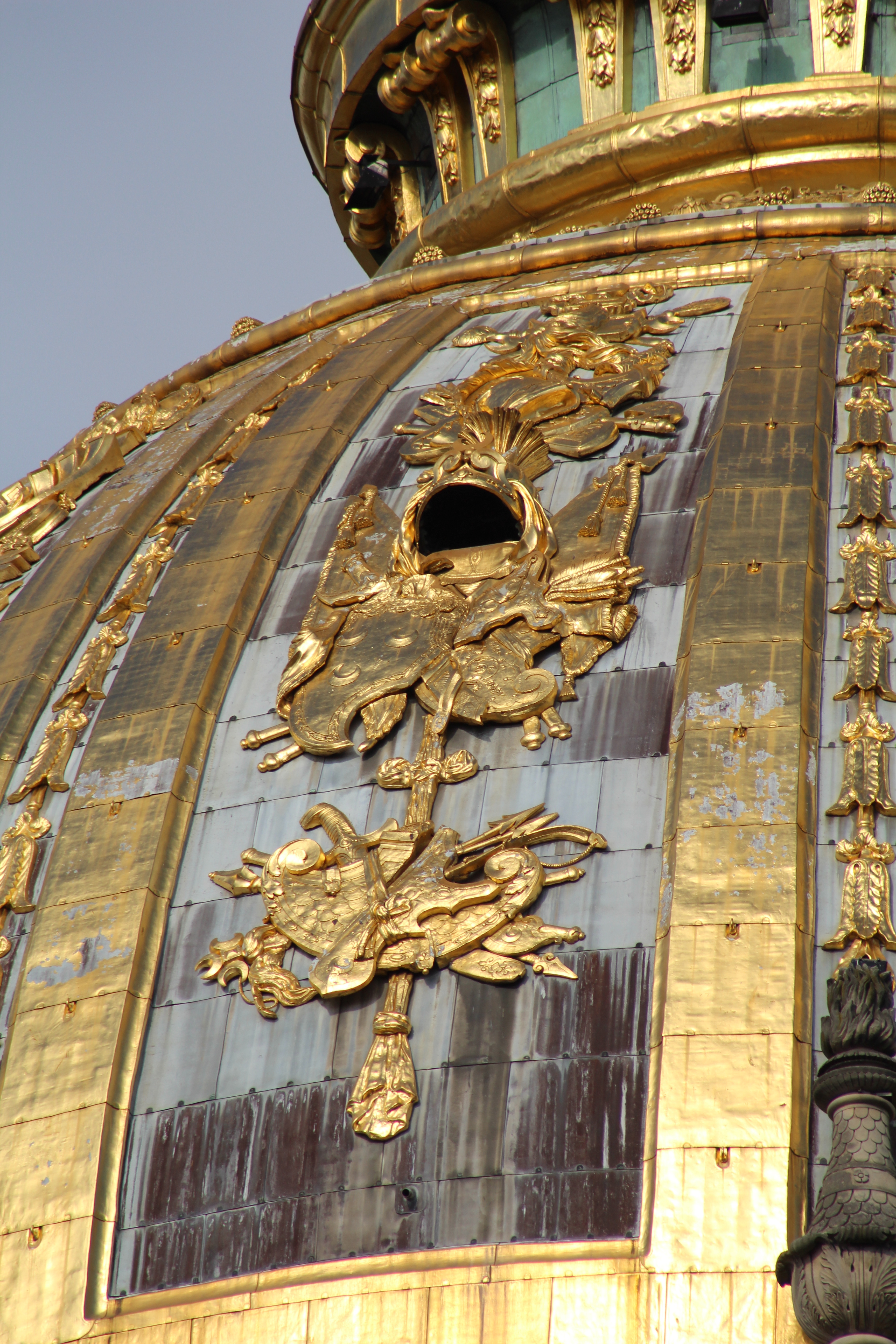 Zoom sur la coupole du dôme des Invalides à Paris.